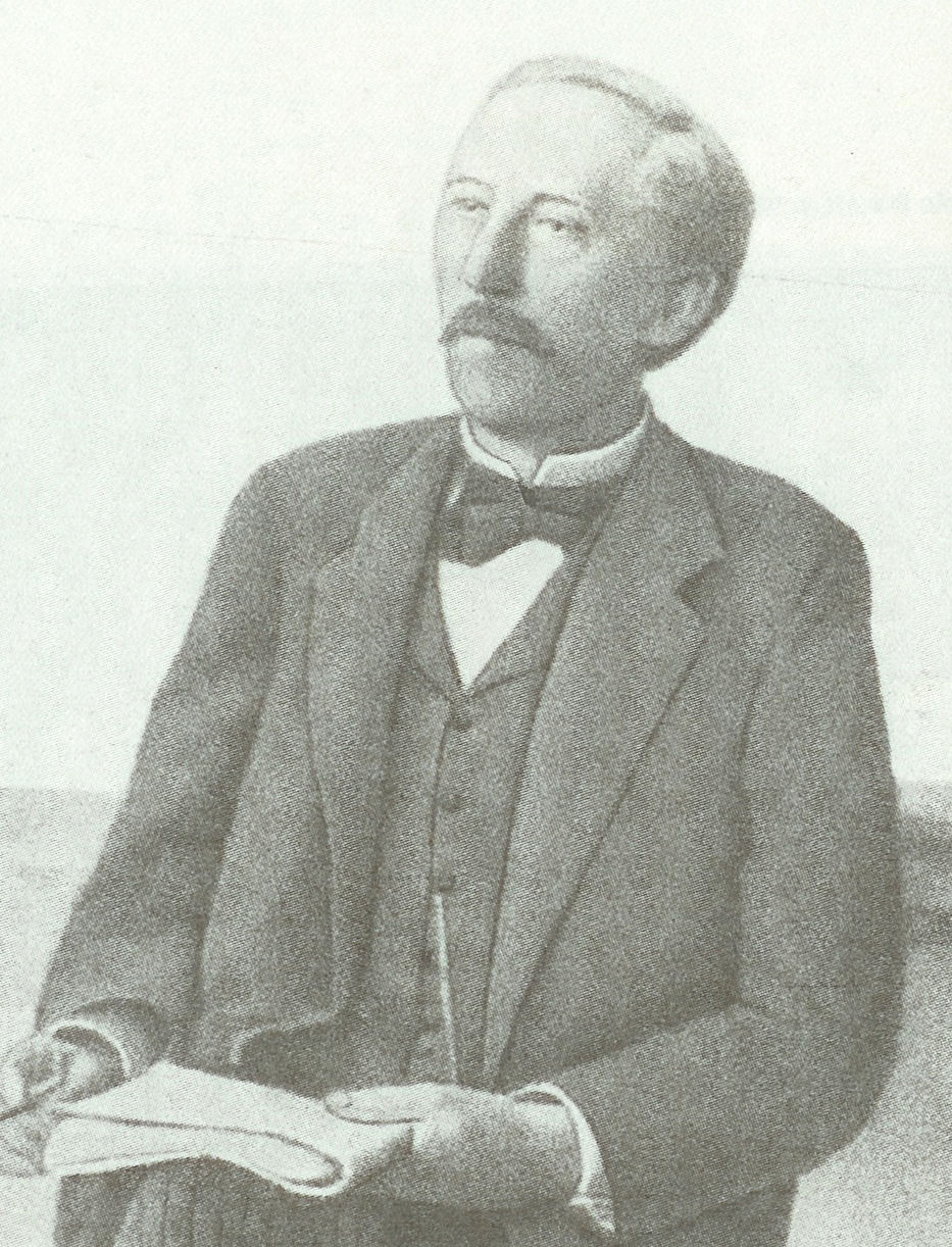 Wojciech Dzieduszyński